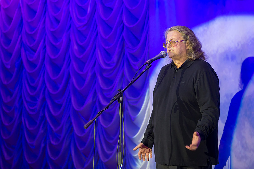 Александр Градский в 2014 году в Приднестровье